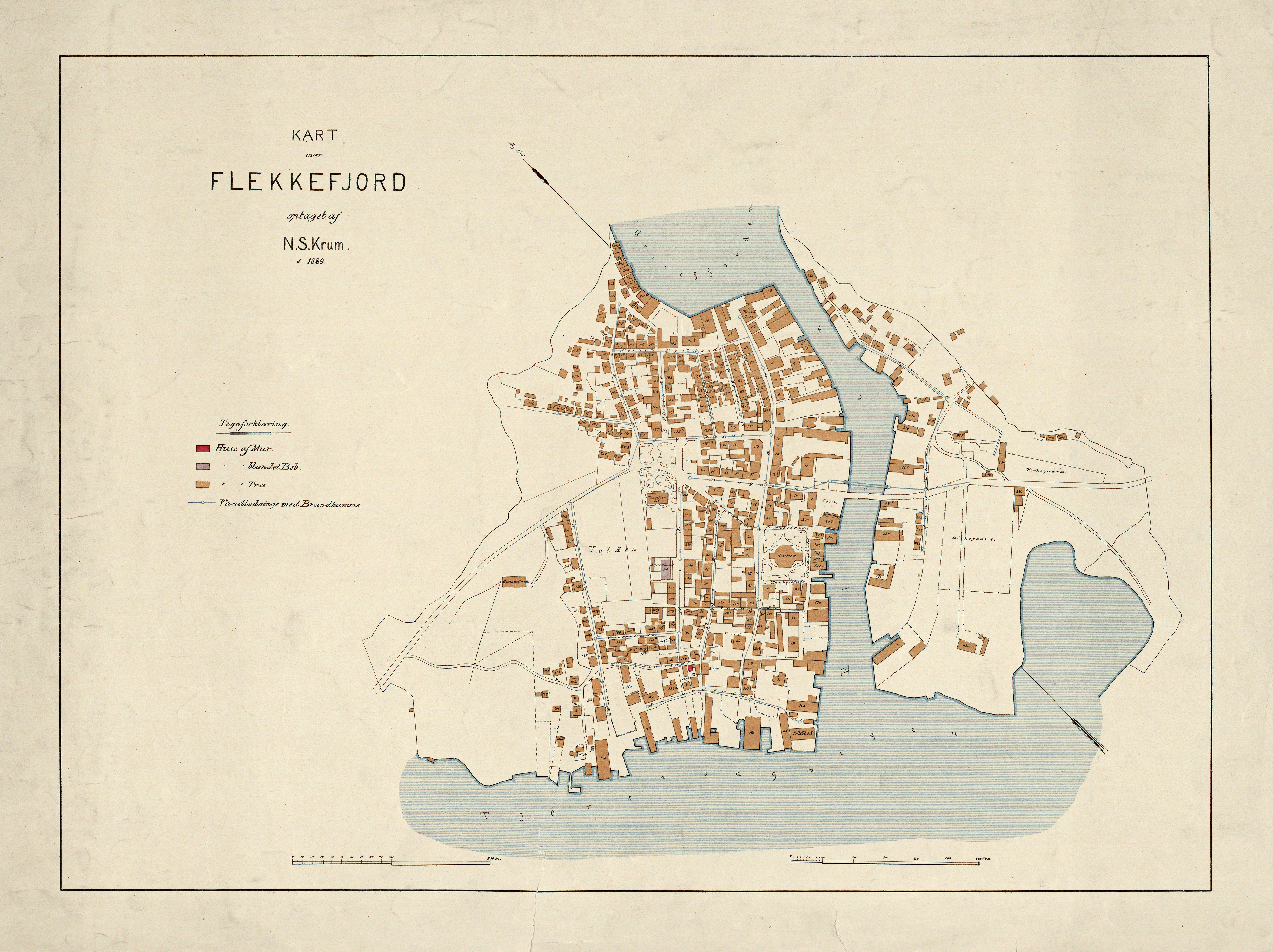 NS Krums kart over Flekkefjord fra 1889.